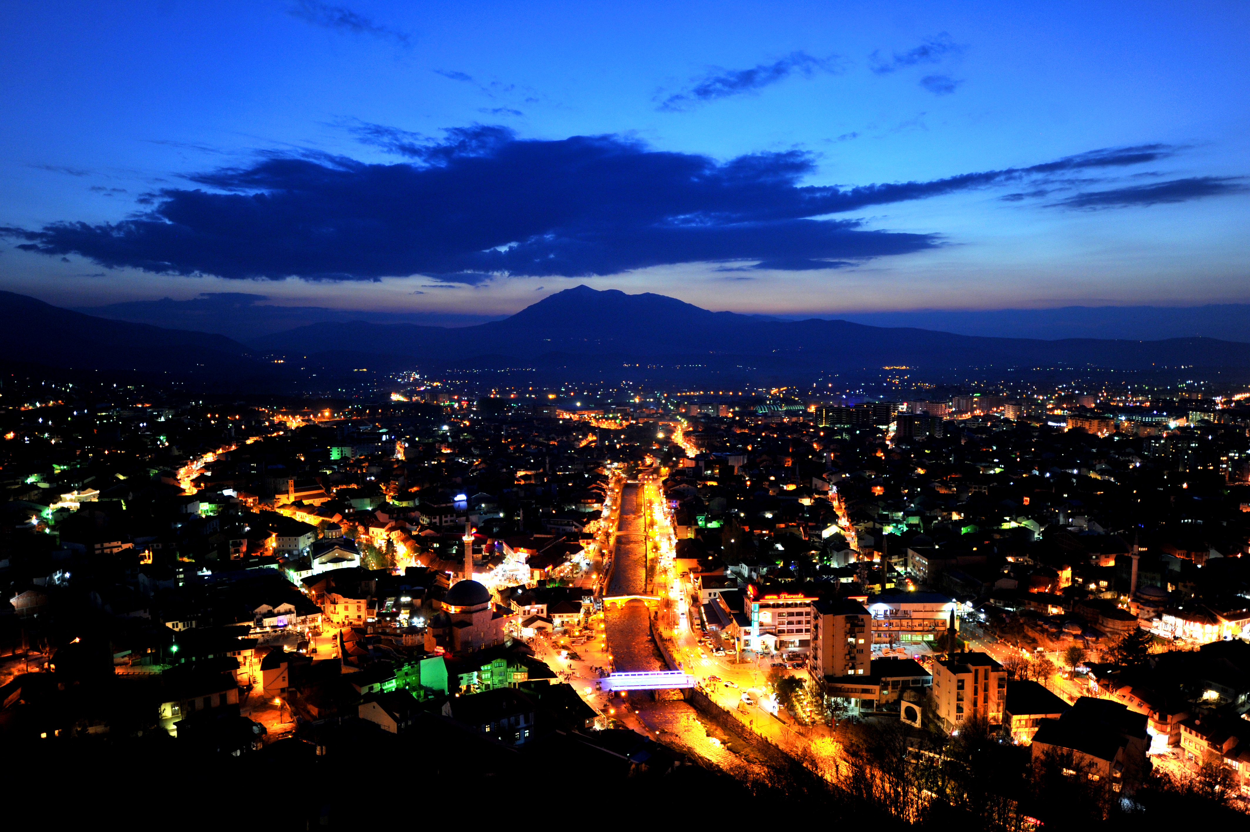 Qendra historike e Prizrenit